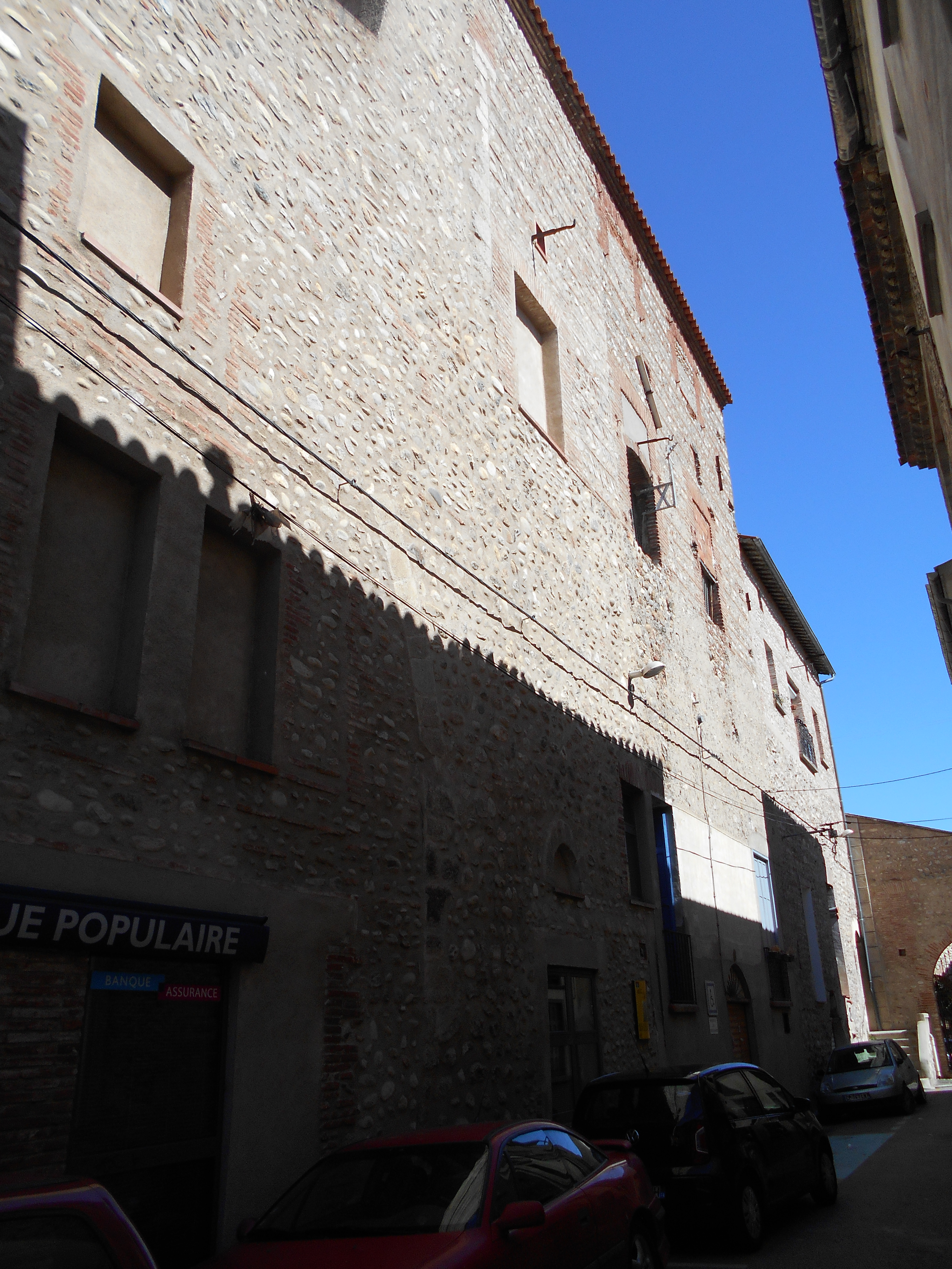 Restes del castell i palau reial de Millars